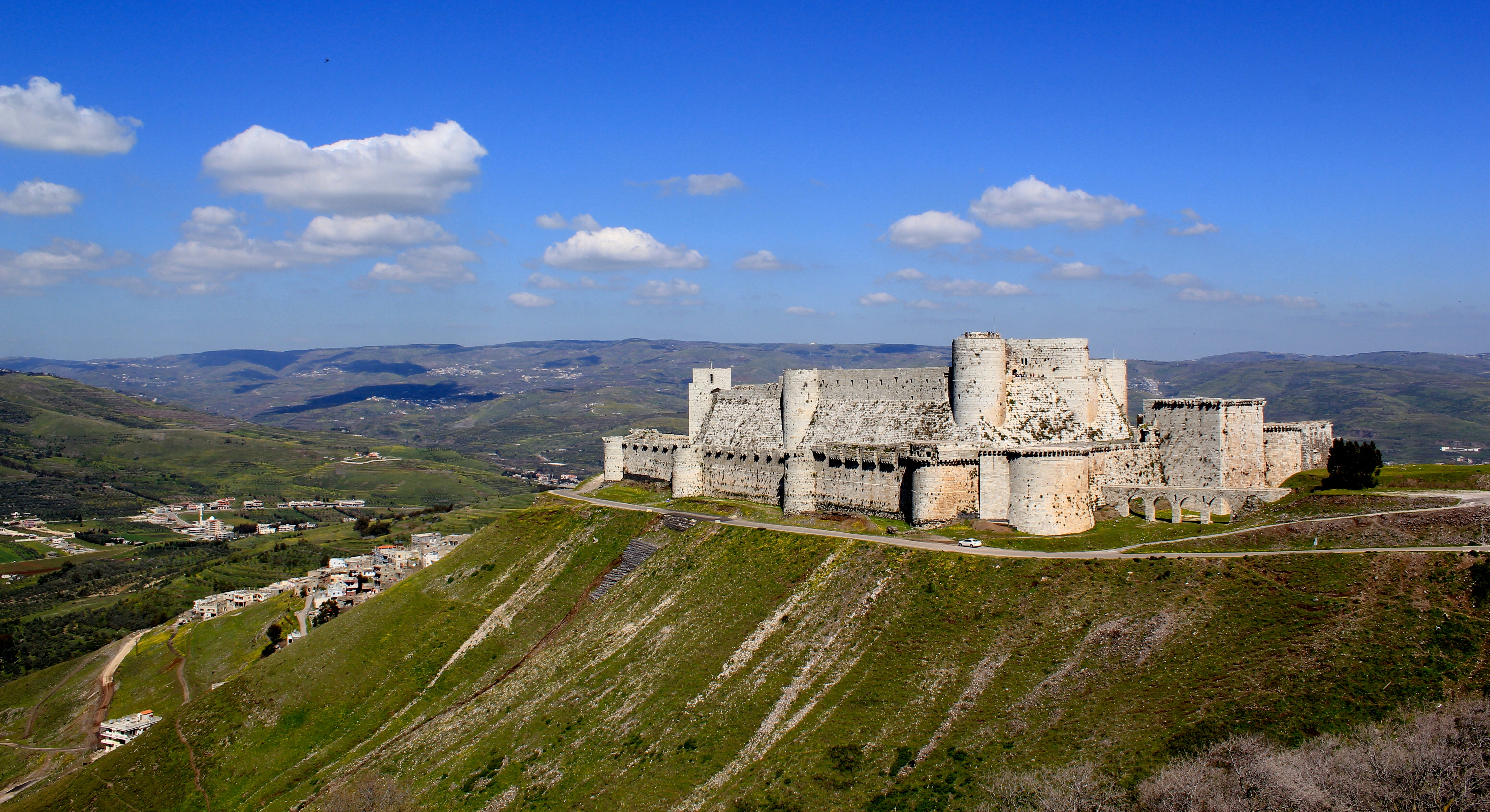 حصن الأكراد أو قلعة الحصن كاشفةً مُروج وتلال بلاد حِمص وأعمالها